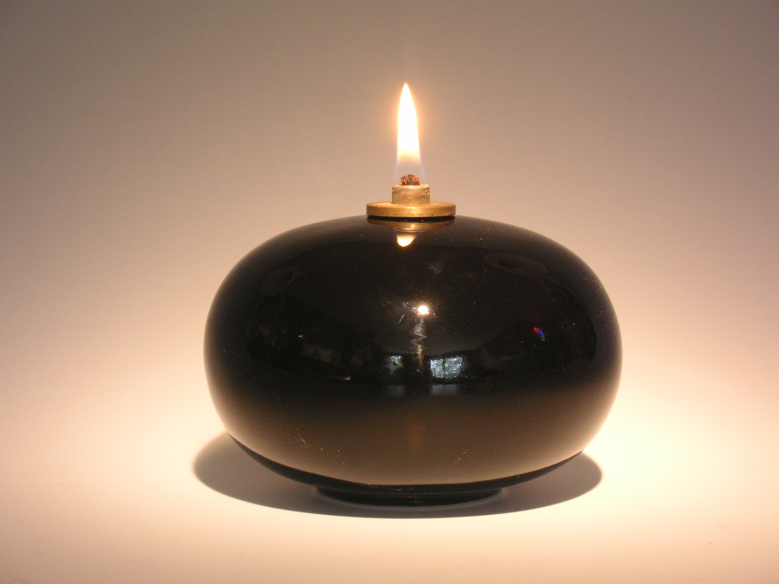 Lykta från Höganäs